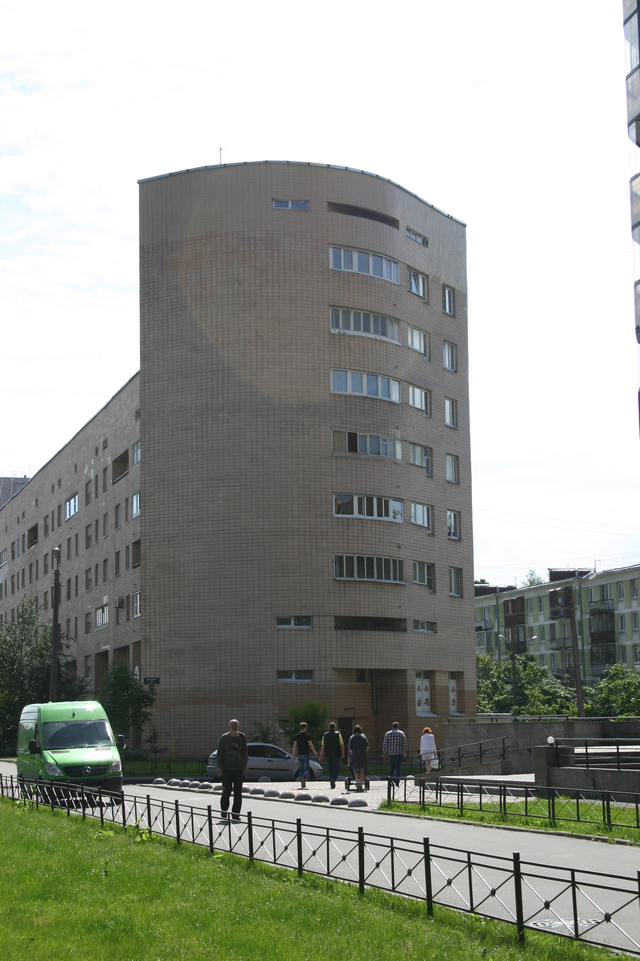 Угол дома №51 корп.1 по Варшавской улице в Санкт-Петербурге. Задел под продолжение улицы Победы.